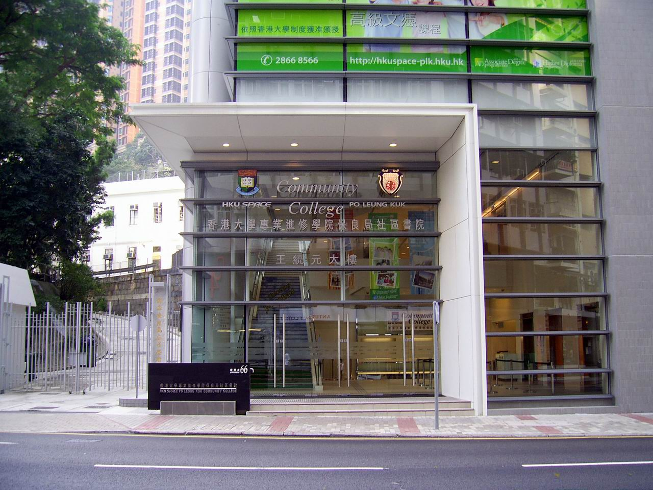 中文（香港）: 港大保良社區書院